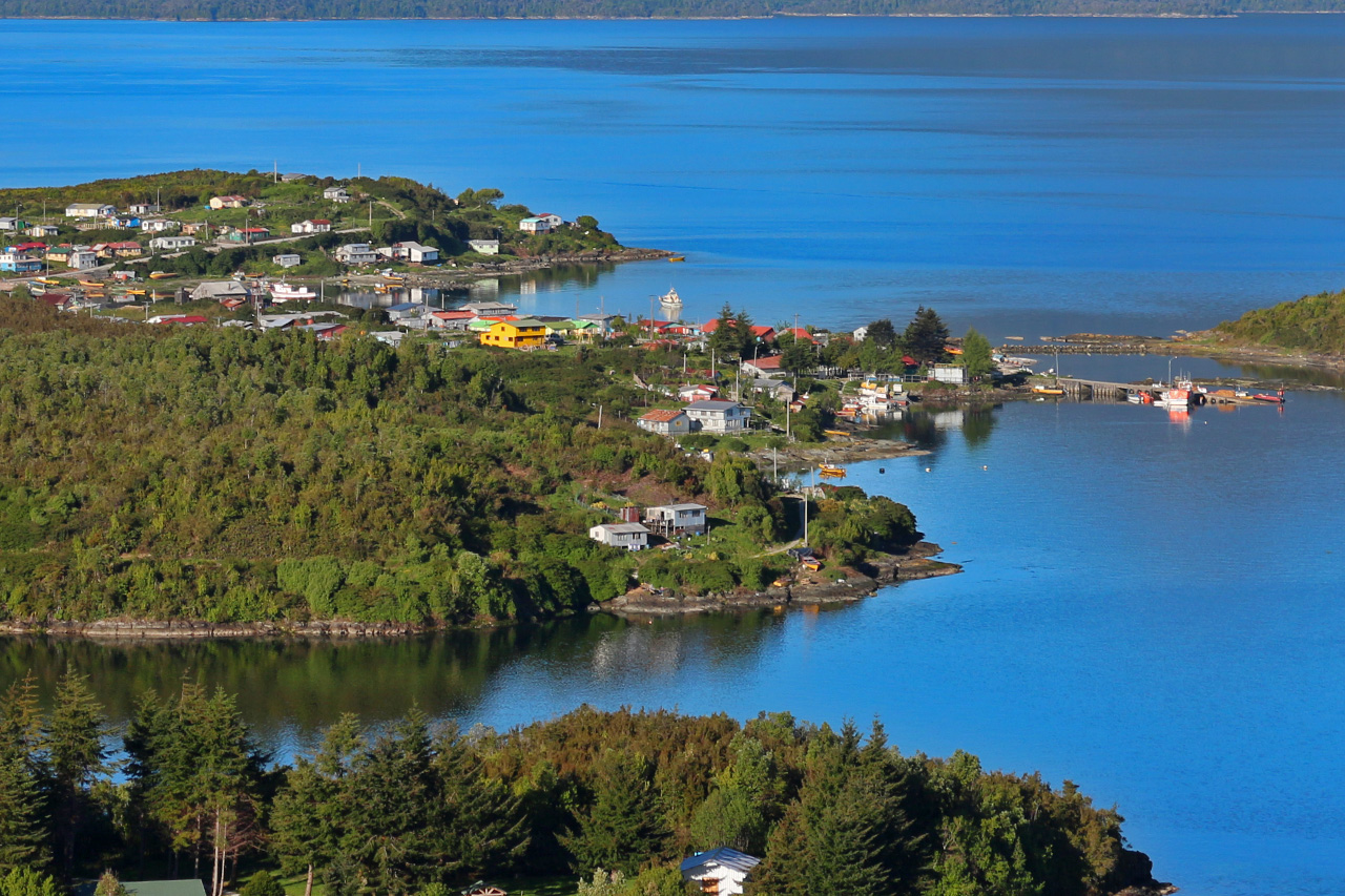 Vista de Caleta Andrade.